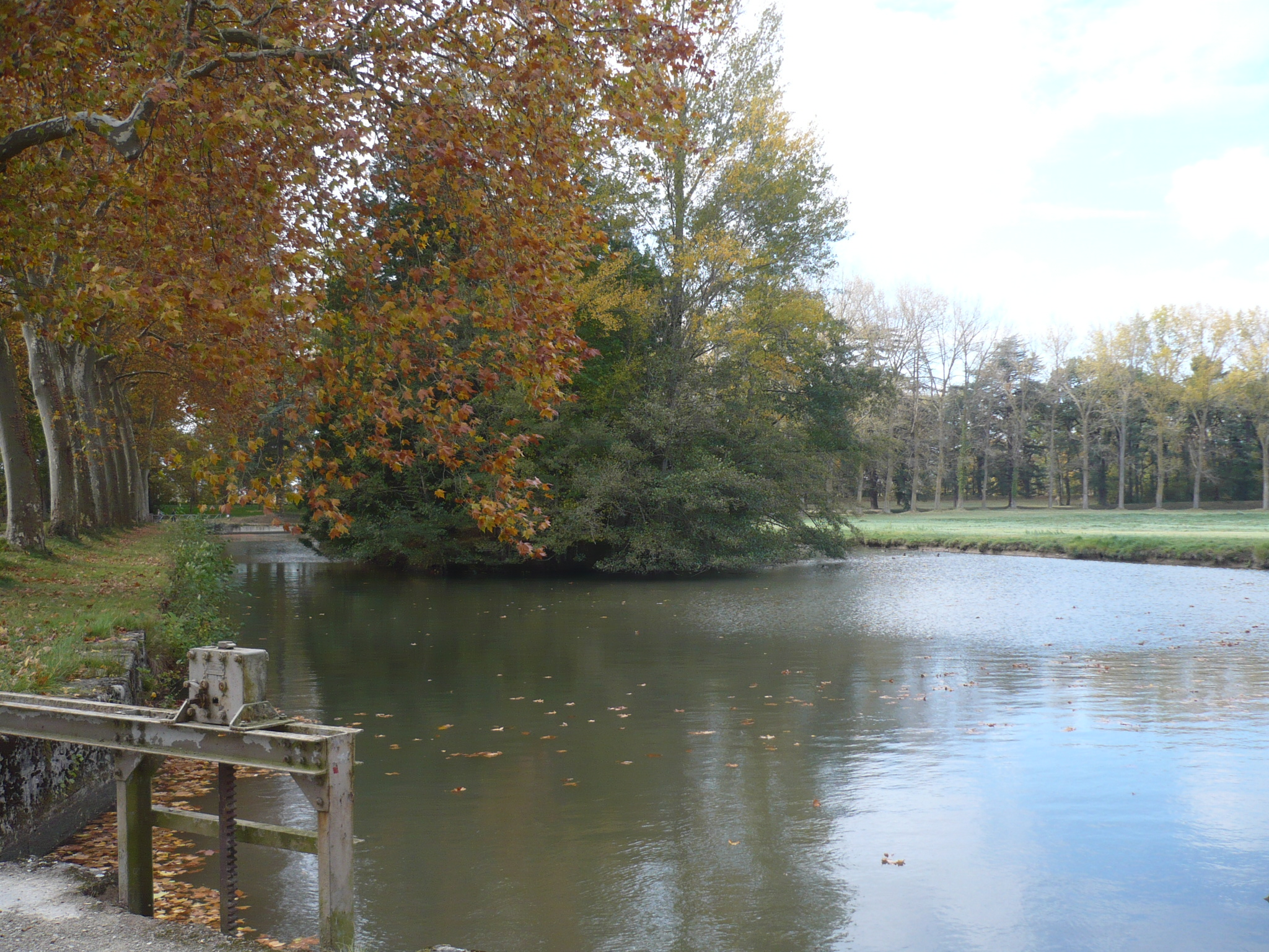 Ehemaliges Speicherbecken Bassin de Naurouze am Canal du Midi